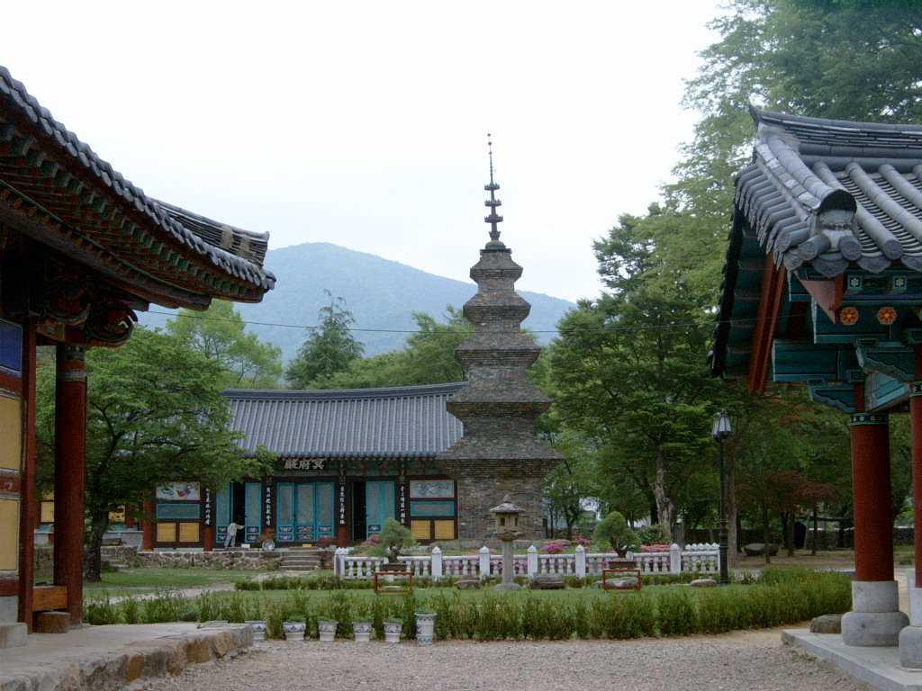 Songnim-gil, Dongmyeong-myeon, District de Chilgok, Gyeongsangbuk